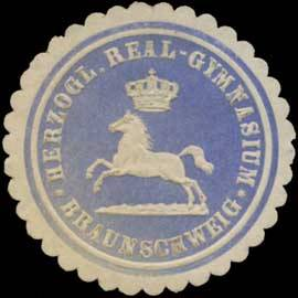 Sealing stamp Title: H. Real-Gymnasium Braunschweig Description: blau, weiß, geprägt Place: Braunschweig size: 4 cm